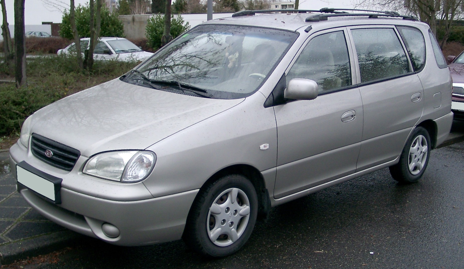 Kia Carens